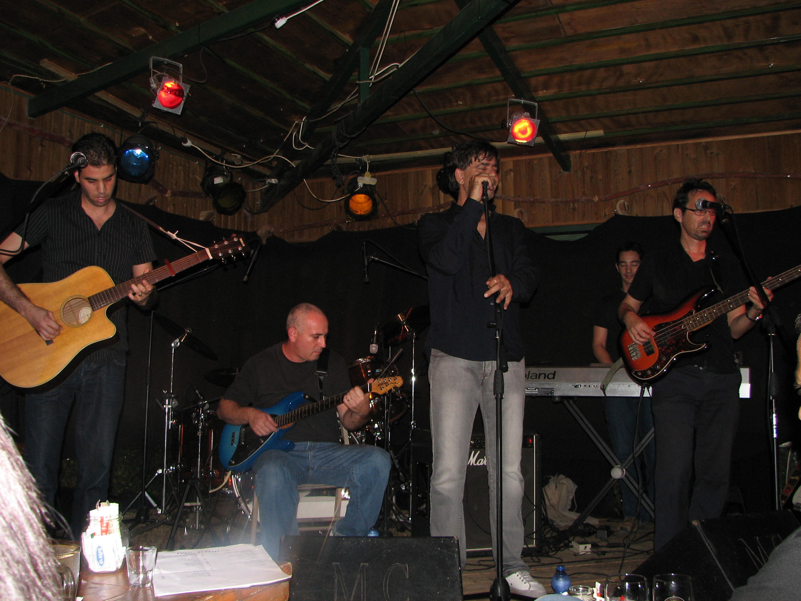 Miklat18 - Israeli Rock Band - Tribute to Arik Einstein מקלט 18 , להקת רוק ישראלית בערב מחווה לשירי אריק איננשטיין. במופע בחמדת ימים בגליל העליון. חברי הלהקה הם: רון אהרונוב: גיטרות, שירה, דורון ליברמן: תופים, גיטרות, צביקה רז: שירה, גיטרות, יניב סבו: קלידים, גיטרות ויגאל באום: בס, שירה.